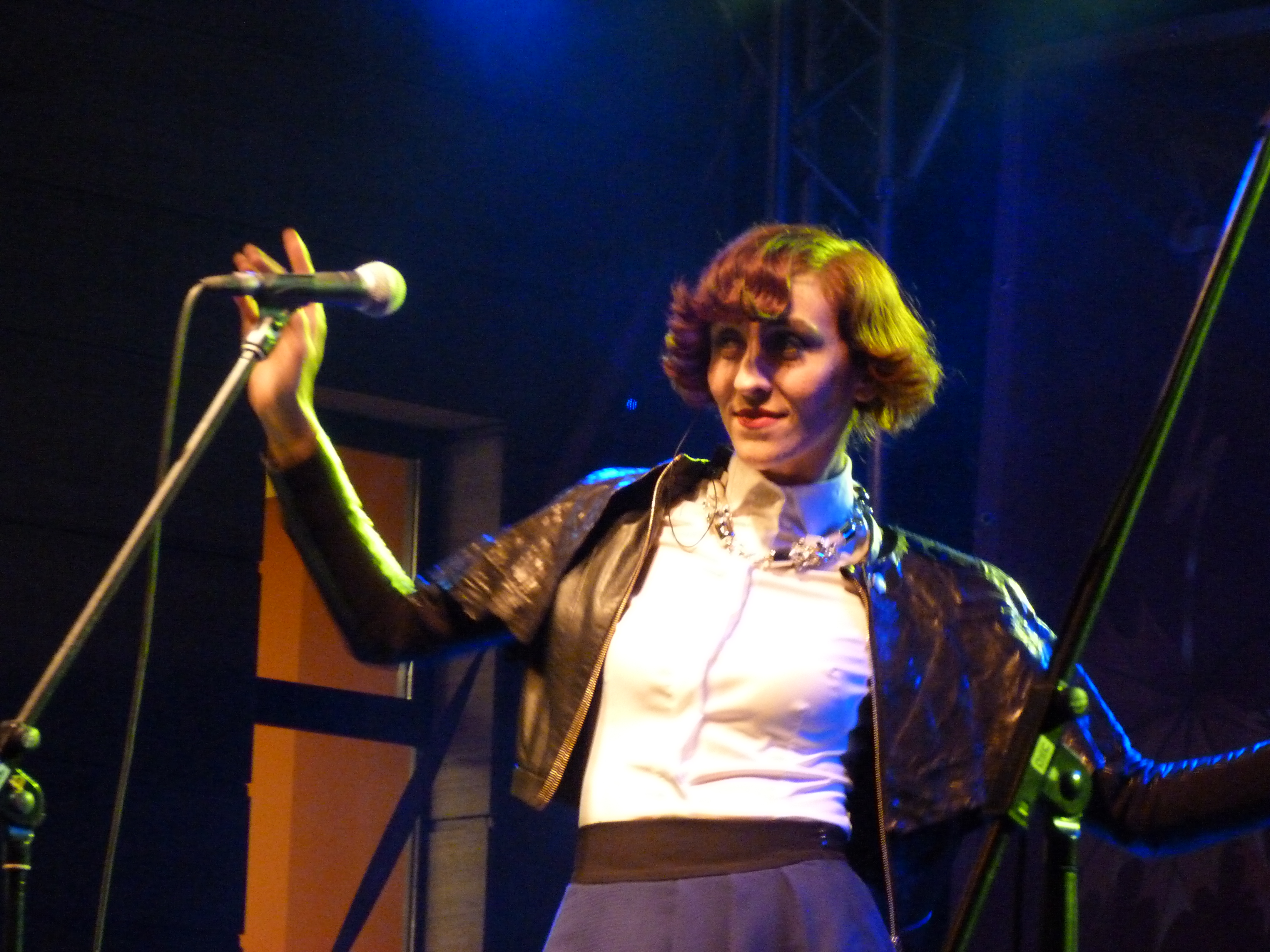 A felvétel 2014. október 11-én, vasárnap készült Budapesten, a Terézvárosban. Terézvárosi Búcsú, Eötvös utca, az Eötvös utca 10 Kulturális Központ előtt. Magashegyi Underground. Bocskor Bíborka. ©© Derzsi Elekes Andor, Budapest, 2014, A kép és filmfelvételek egészben, vagy részletekben másolását, bármilyen úton történő sokszorosítását és felhasználását a szerző ellenérték nélkül, jogutódjaira is kihatóan megengedi. Az engedély kiterjed a kereskedelmi célú hasznosításra is. Kéri azonban nevének feltüntetését a felhasználás során. A Metapolisz sorozat valamennyi képe és filmje Creative Commons alatti valamint kereskedelmi - for profit - célra is felhasználható. Ajánlott hivatkozás: Derzsi Elekes Andor: Metapolisz DVD line